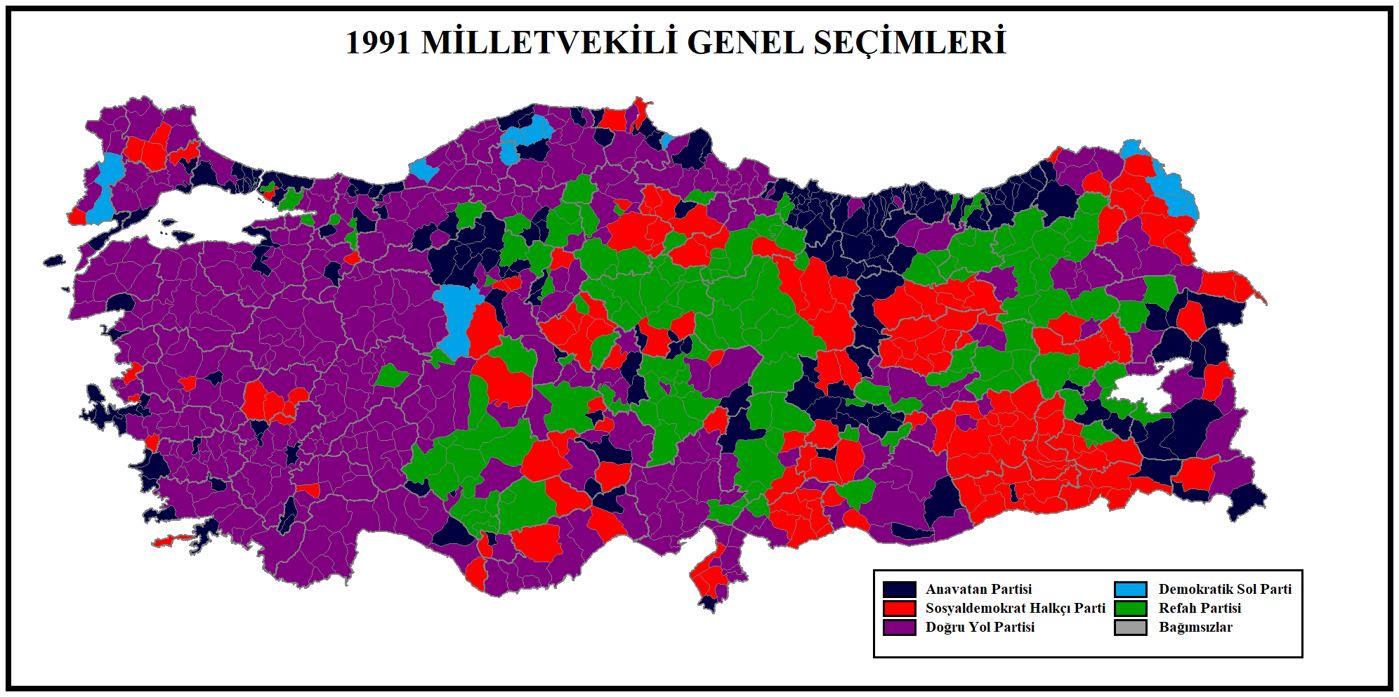 1991 genel seçimleri sonuçlarının Türkiye ilçeler haritasında gösterimi.